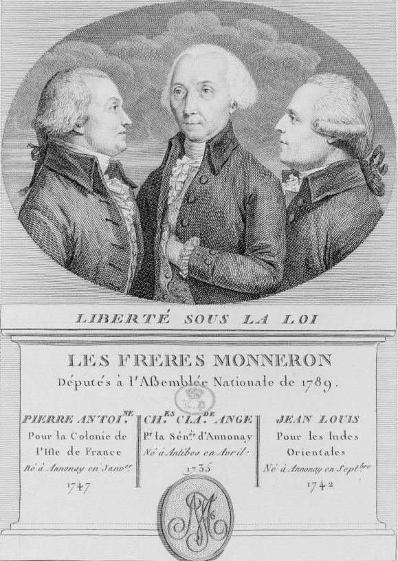 Les trois frères Monneron, députés à l'Assemblée nationale de 1789. Charles-Claude-Ange, 1735-1799 pourr la sénéchaussée d'Annonay né à Antibes Jean Louis, 1742-1805 pour les Indes orientales Pierre-Antoine, 1747-1801 pour la colonie de l'Isle de France Estampe publiée à Paris, chez le sr Dejabin, en 1789-1791. Notice bibliographique de la Bnf.